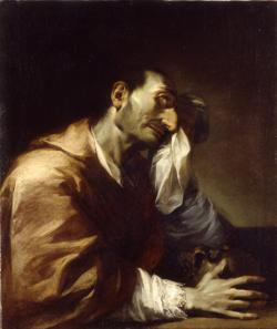 San Carlo Borromeo